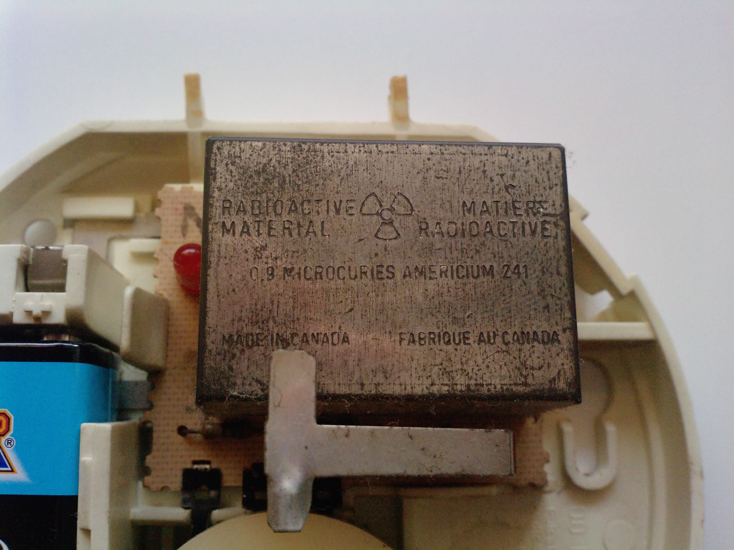 Fotografía tomada del interior de una alarma de humos.